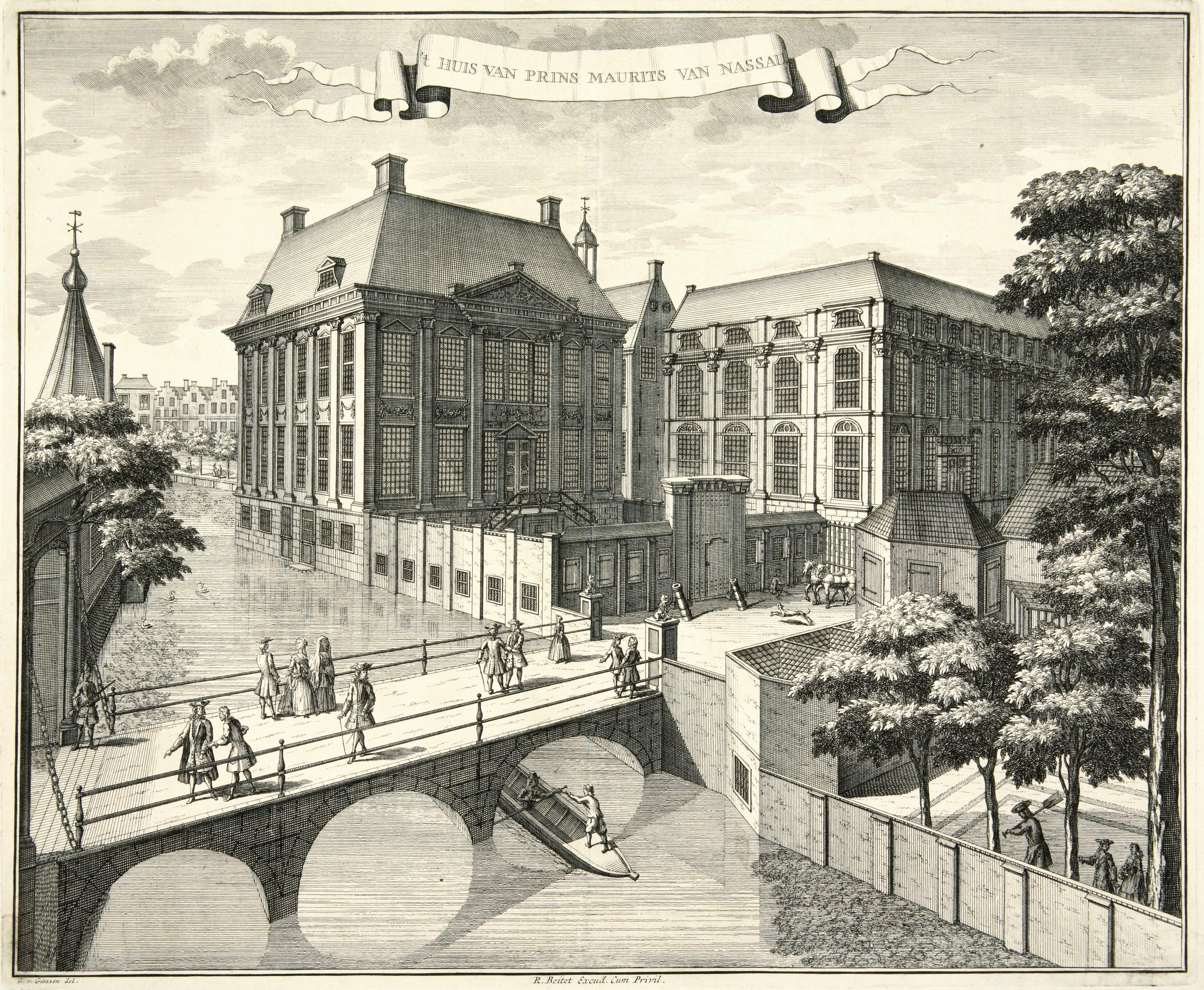 De brug over de omgrachting van het Binnenhof gezien naar de Maurits- of Grenadierspoort. In het midden en links van het midden het Mauritshuis, waar tegenover de overtuin van dit huis, grenzend aan de tuin van het Huijgenshuis aan het Plein. Op de achtergrond rechts van het midden het huis De Tarouca aan het Plein, hoek Korte Vijverberg.